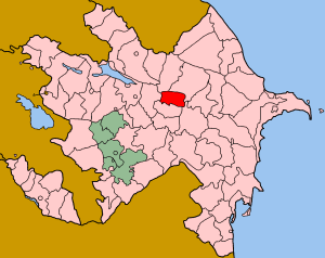 Map of Azerbaijan showing Goychay (Göyçay) nrayon.